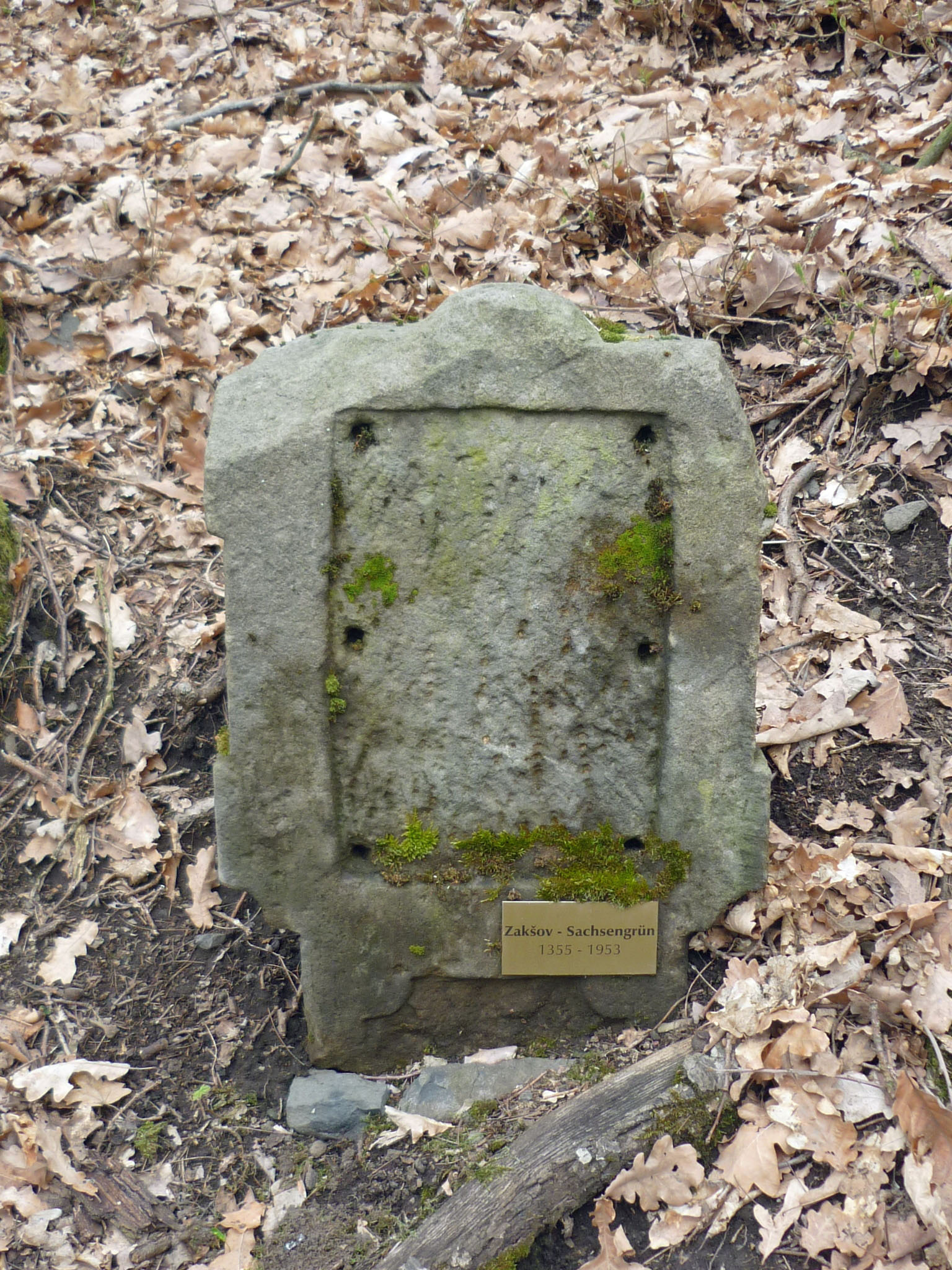 Lapidarium der zerstörten Orte im Duppauer Gebirge auf dem Winteritzer Kapellenberg: Bildstock aus Zakšov – Sachsengrün (1355-1953)